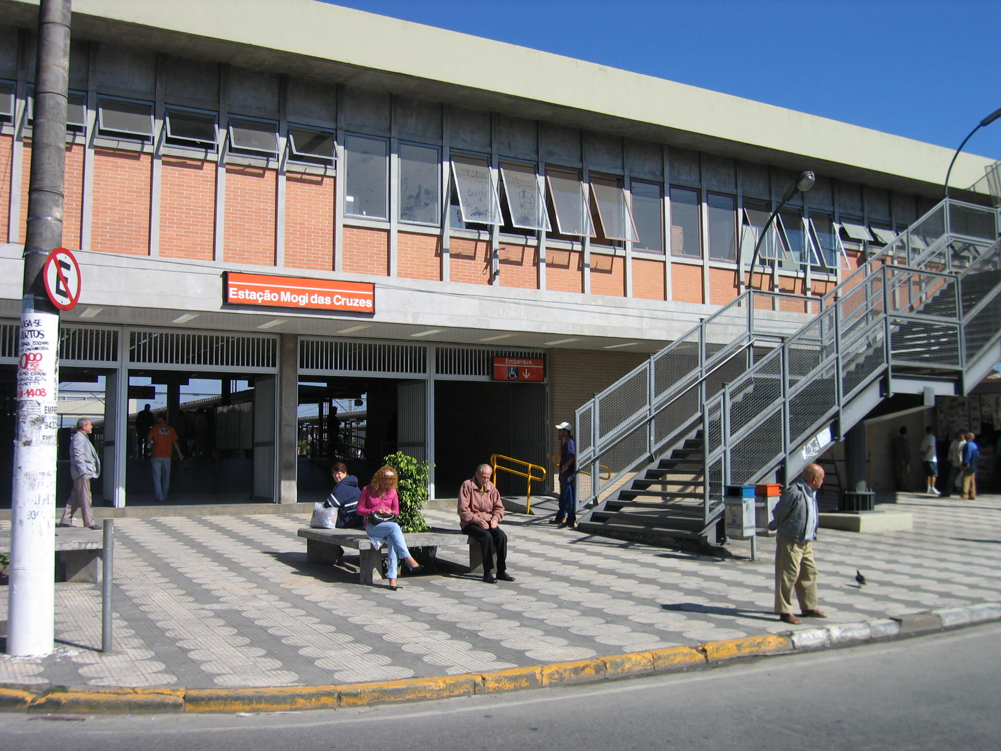 Foto da Estacao